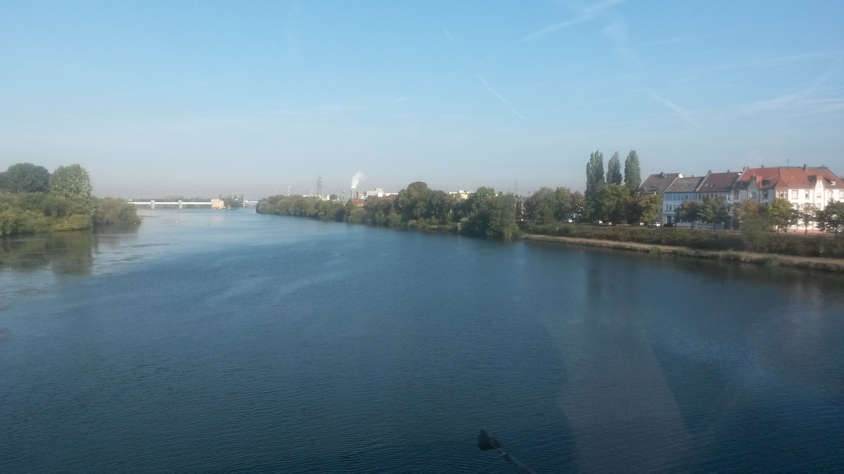 Gewerbegebiet mit Neckar und Neckarkanal in Ladenburg (Aufnahme aus dem Zug auf der Neckarbrücke)